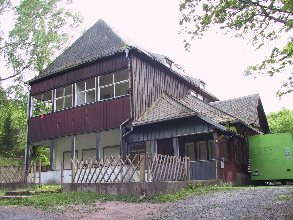 Wilischbaude (leider dem Verfall preisgegeben)